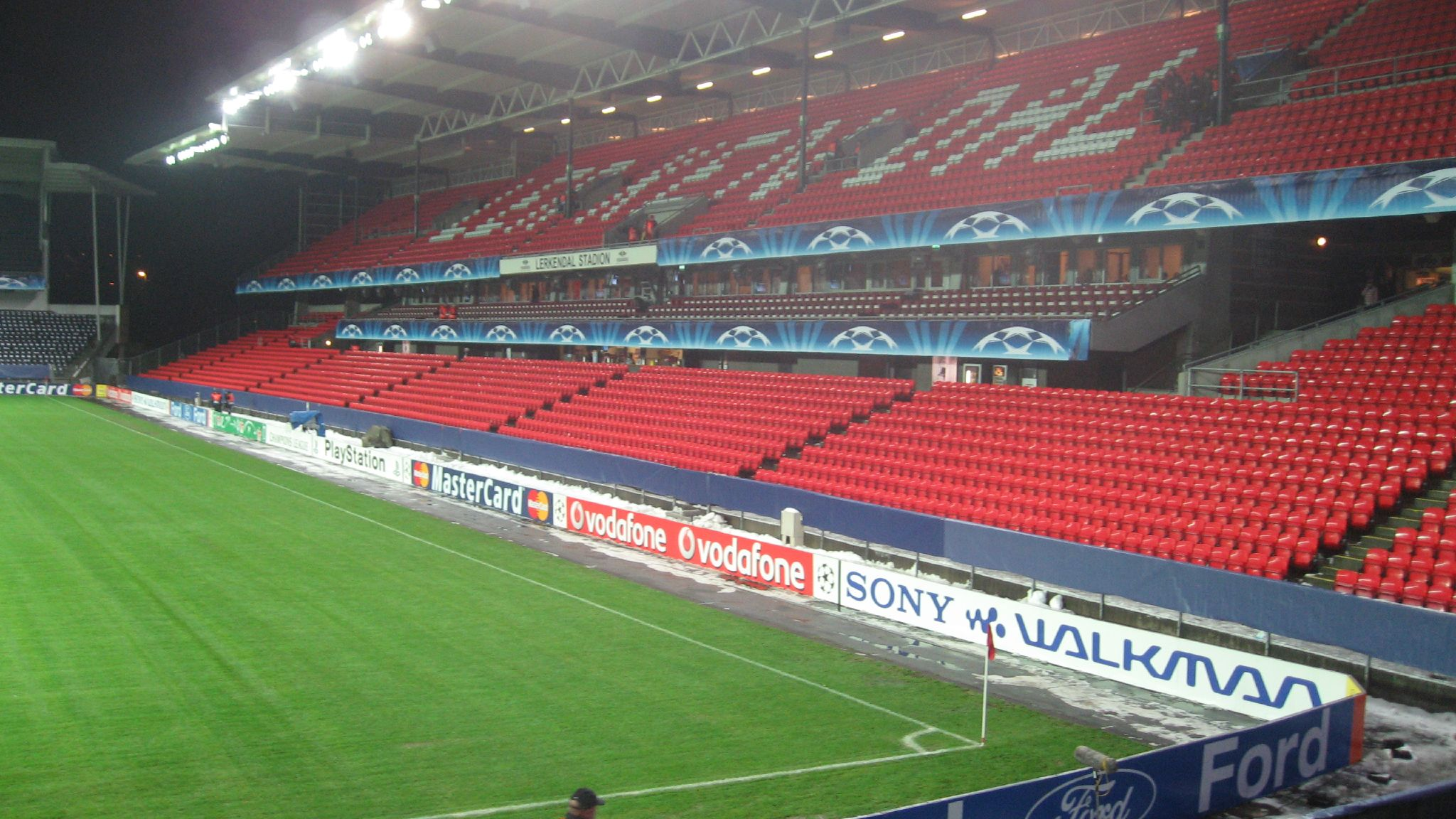 rosenborg (0) v CHELSEA (4) - 28/11/07